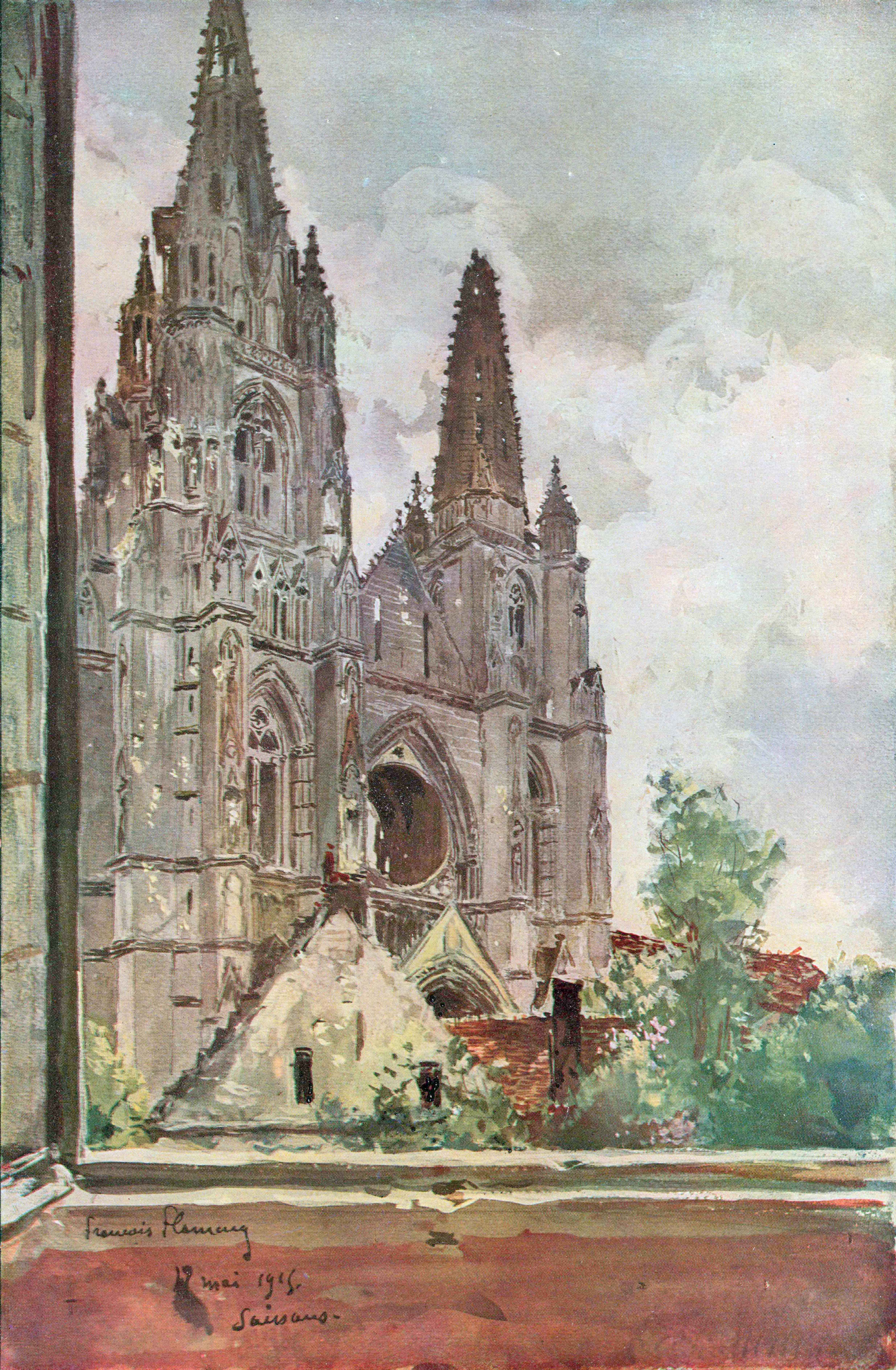 Scan of L'ILLUSTRATION No 3791 30 Octobre 1915. No 3791, 30 Octobre 1915, Les Ruines de Saint-Jean-des-Vignes a Soissons.